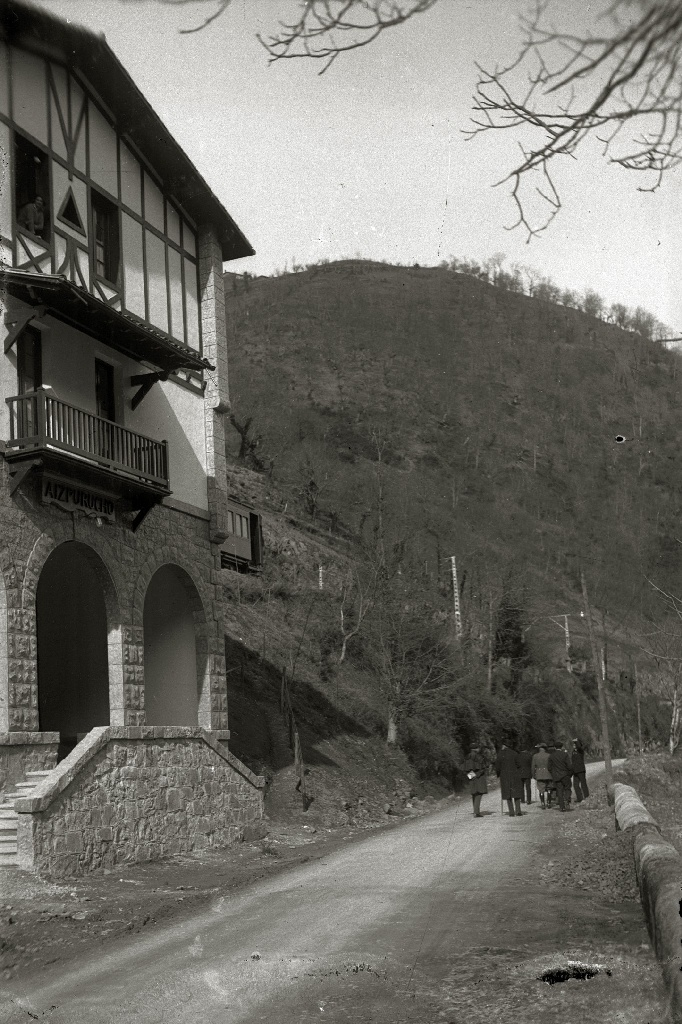 Título original: Estación de ferrocarril de Aizpurucho (1/1) Localización: Azcoitia (Guipúzcoa)